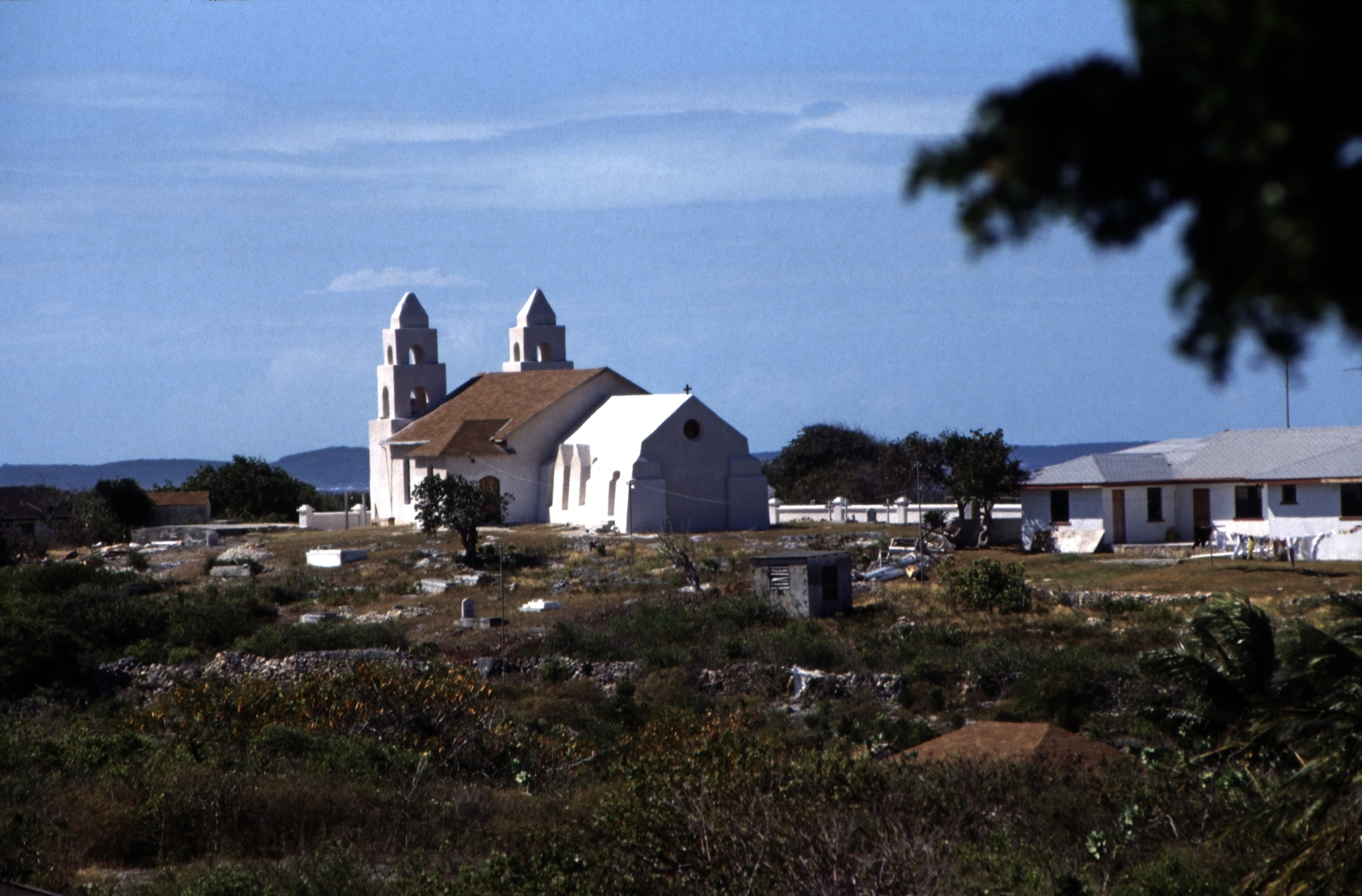 St. Paul's Anglican Church in Clarence Town auf Long Island. Pater Jerome (John Hawes) baute Kirchen in den 20iger und 30iger Jahren des 20.Jahrhunderts auf vielen Inseln der Bahamas. Zwei davon die Twin Churches auf Long Island: die römisch-katholische St. Peter Kirche und hier zu sehen die St. Paul's Anglican Church.